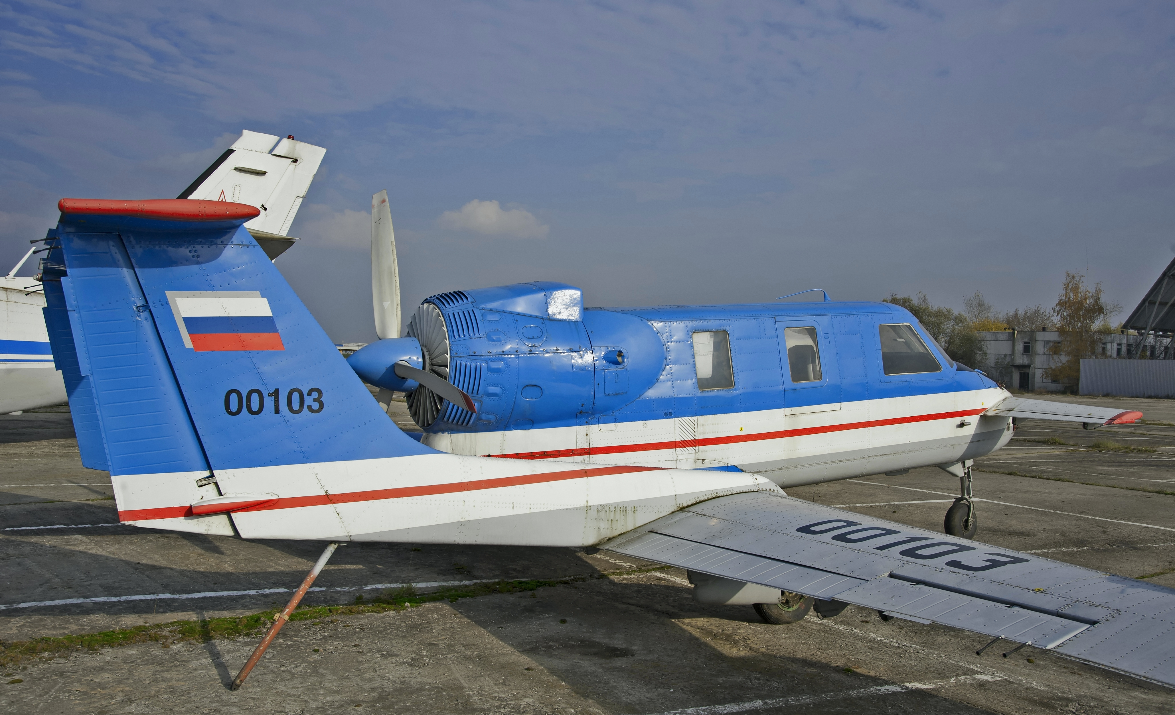 Triplane "Molniya".